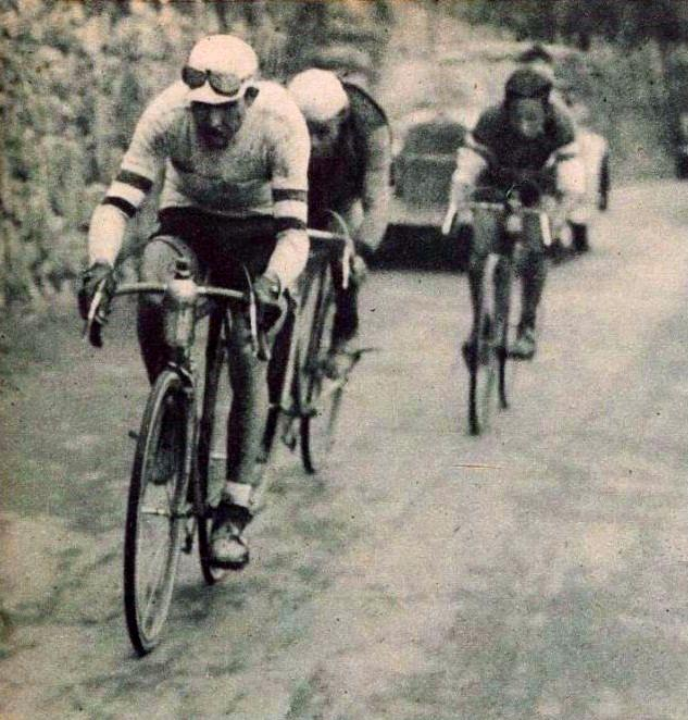 Gino Bartali, vainqueur du Tour de Lombardie en novembre 1936.